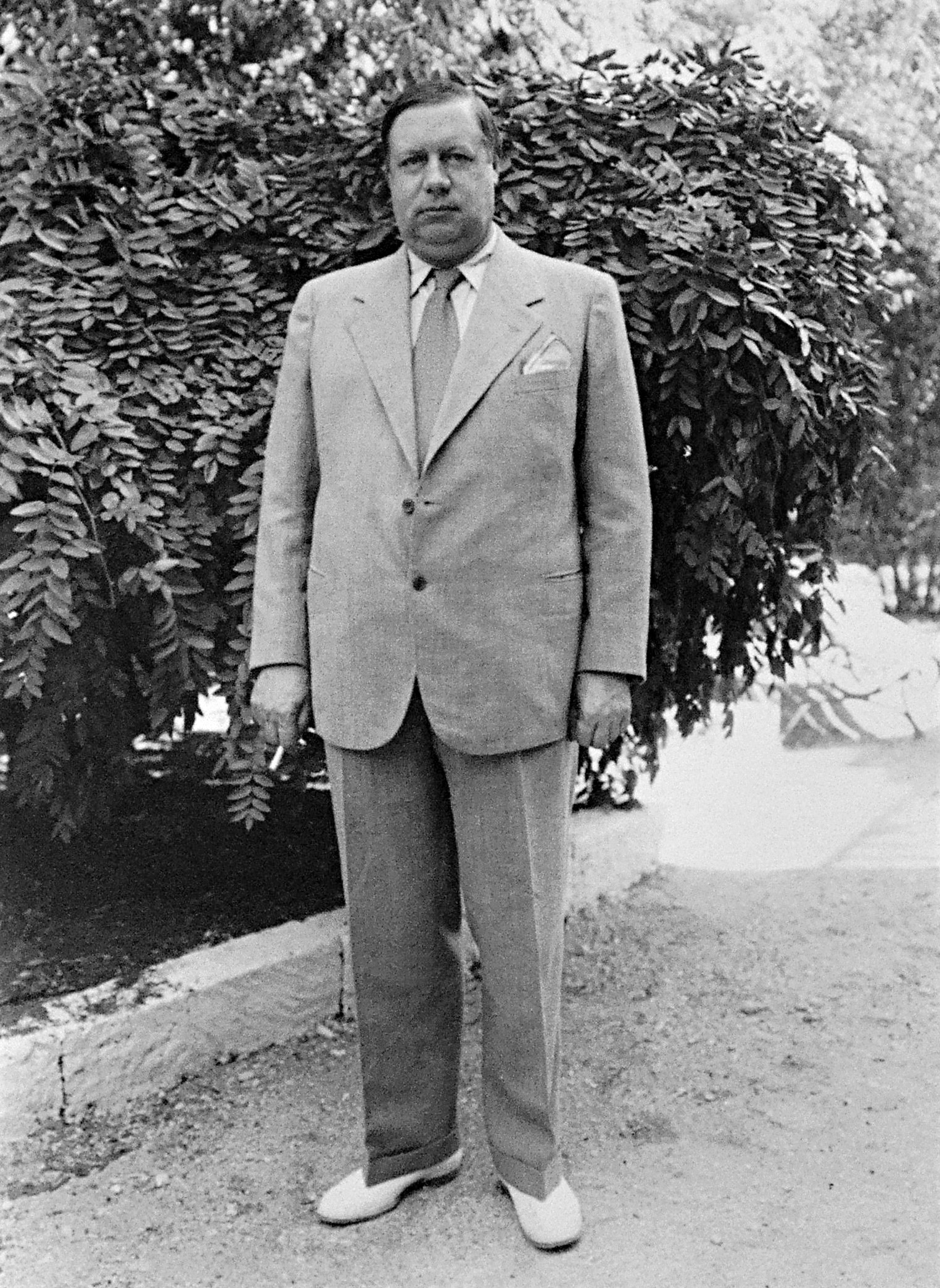 Командующий войсками Закавказского фронта Маршал Советского Союза Фёдор Иванович Толбухин. Одна из немногих фотографий, на которых о запечатлён в гражданской одежде